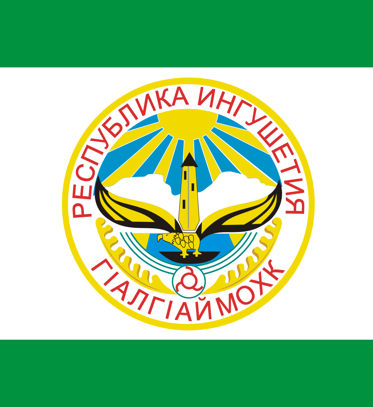 Штандарт Президента Республика Ингушетия